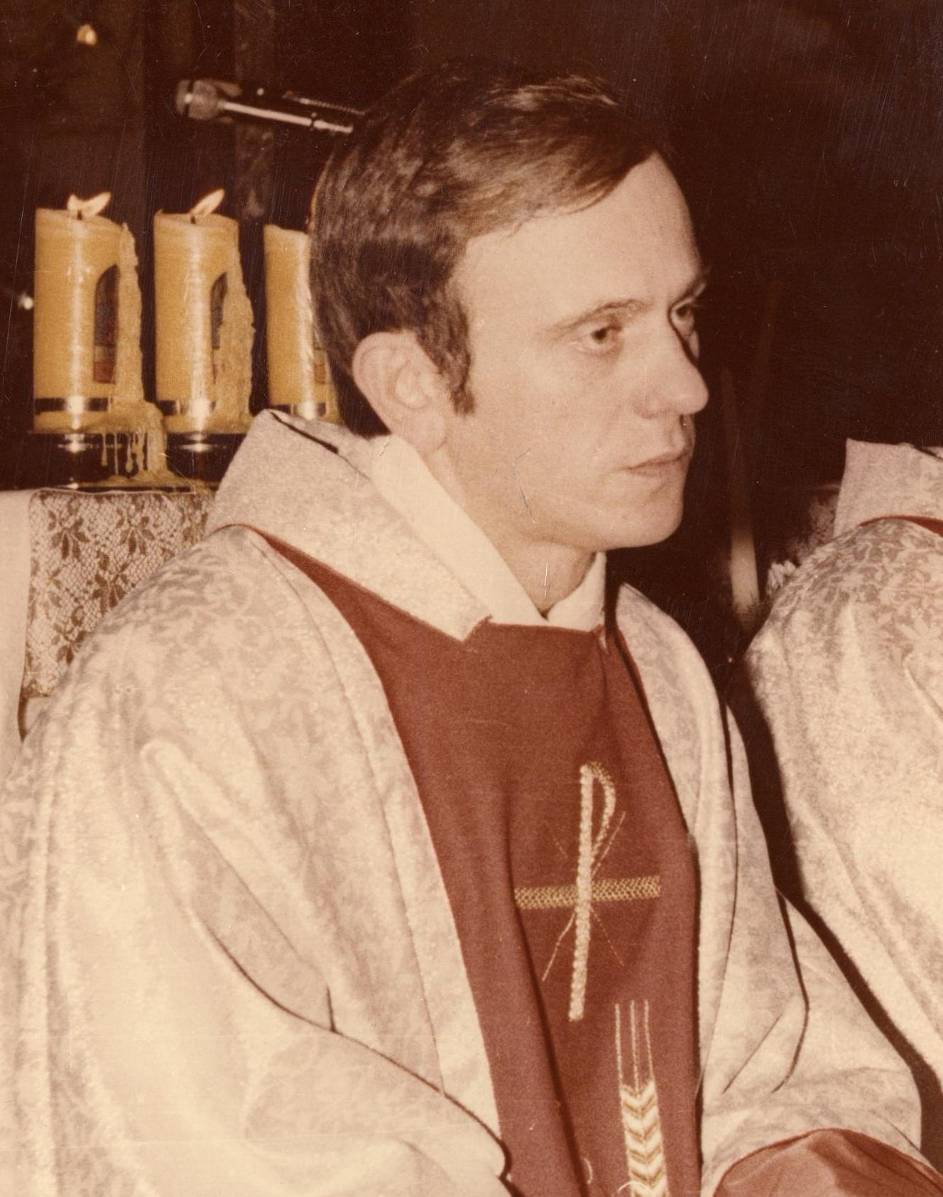 Jerzy Popiełuszko - zdjęcie z Europeany i Cyfrowego Archiwum Pamiątek